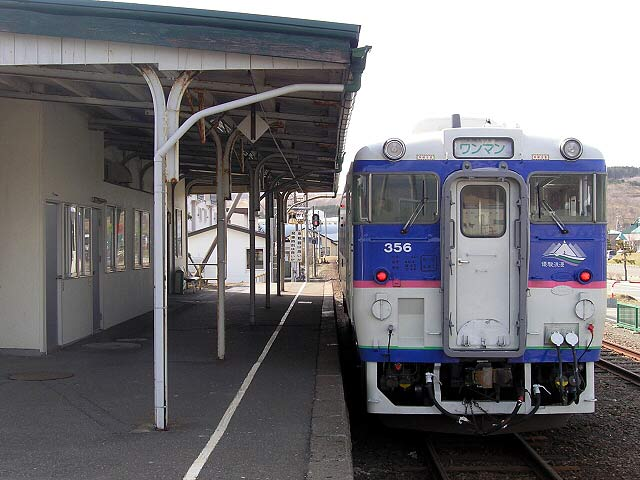 Hidaka Main Line train at Samani Station.